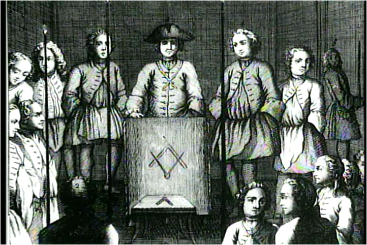 grabado antiguo que representa una reunión masónica